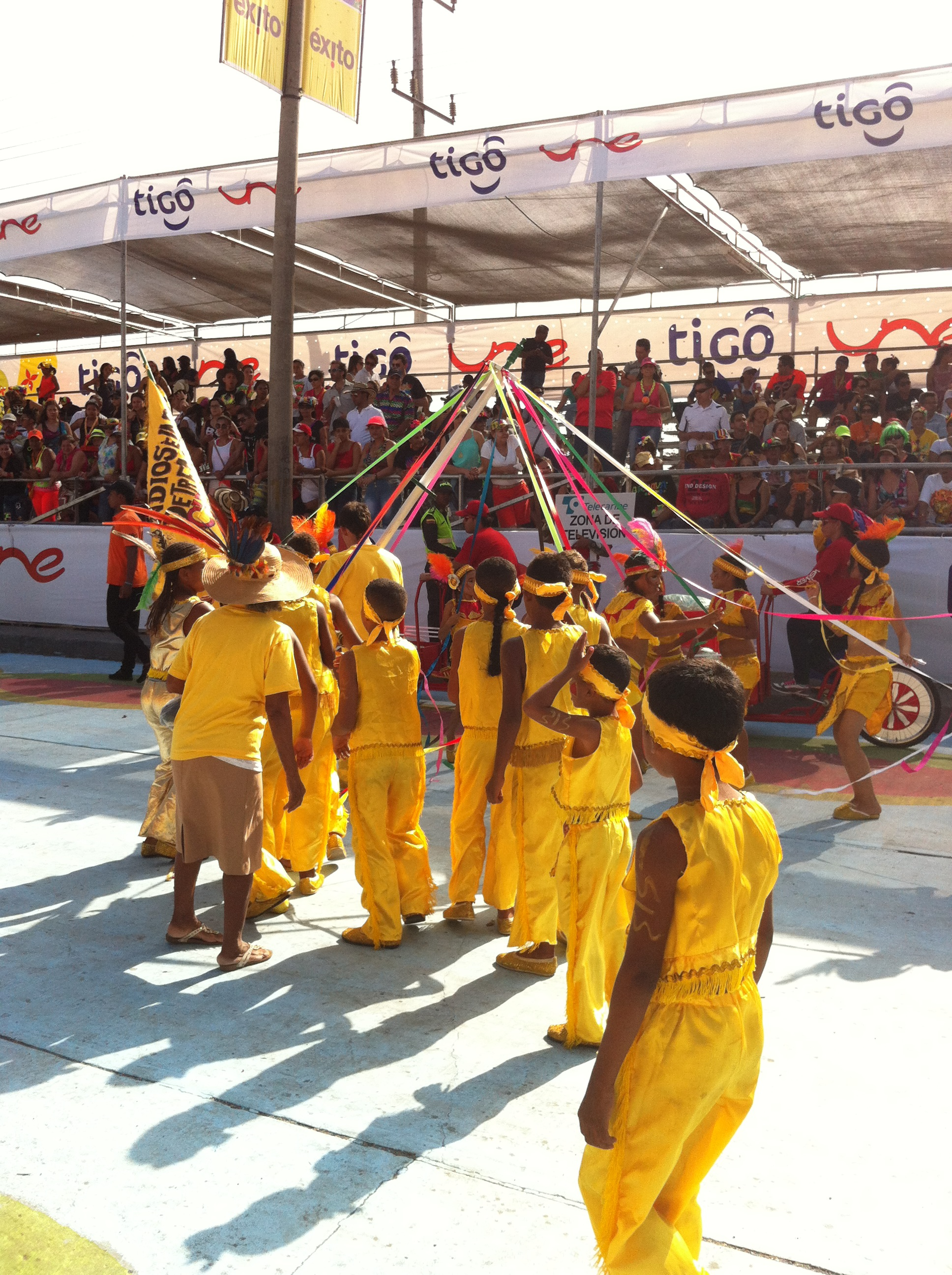 Danza de los Indios - Carnaval de Barranquilla